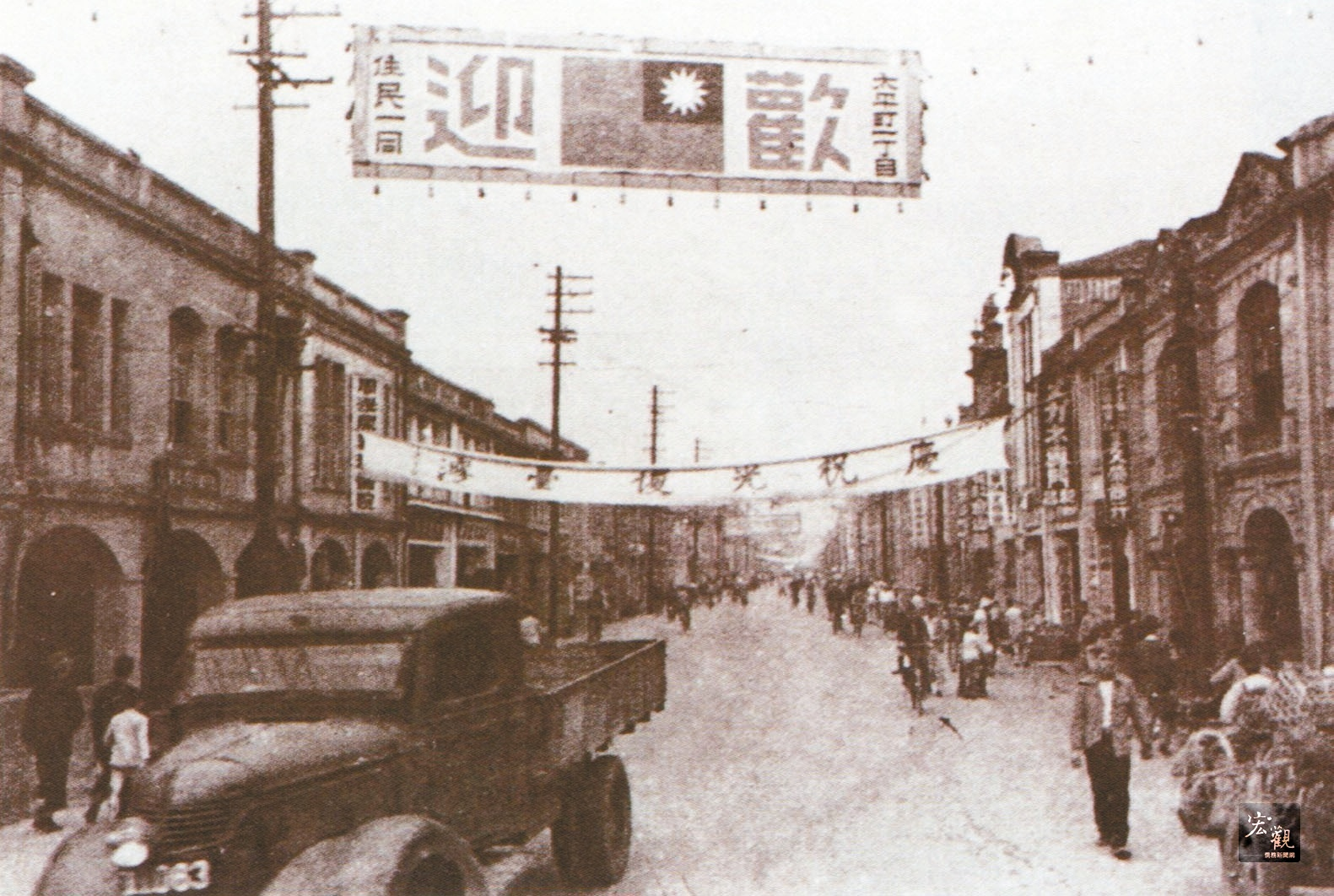 今臺北市延平北路於約1945年